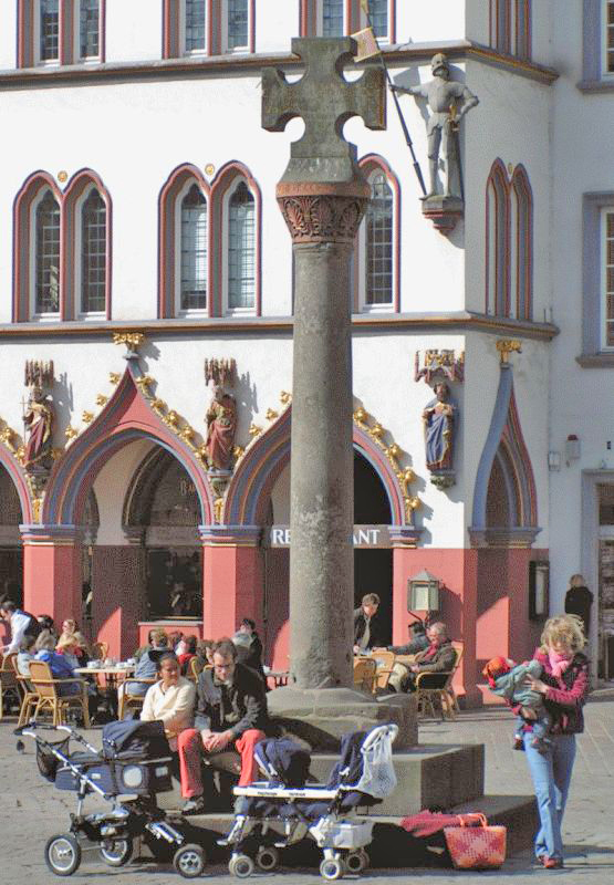 Maartkräiz Tréier.